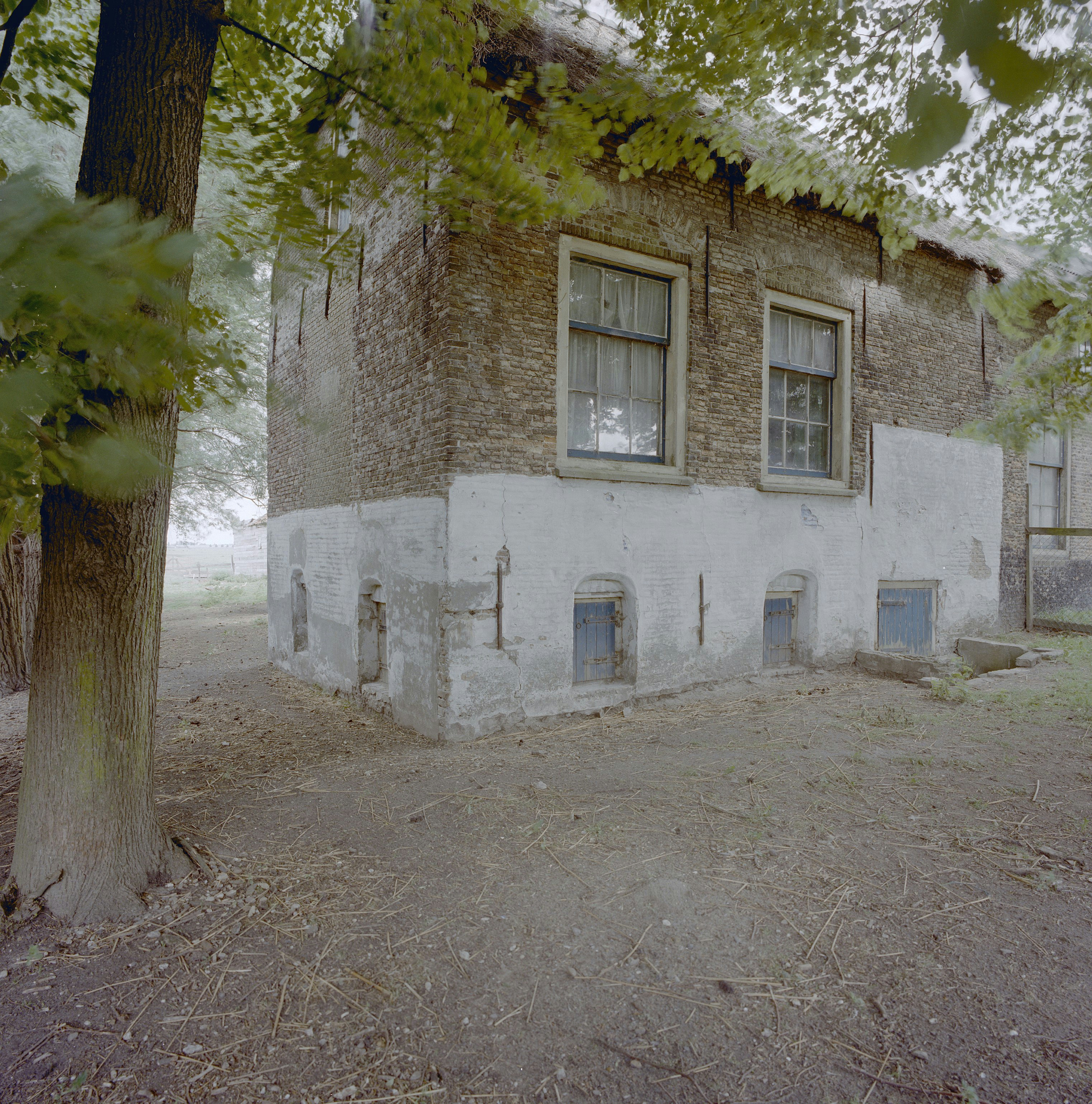 Torenzicht: Exterieur OPKAMER, VOORGEVEL, LINKER ZIJGEVEL